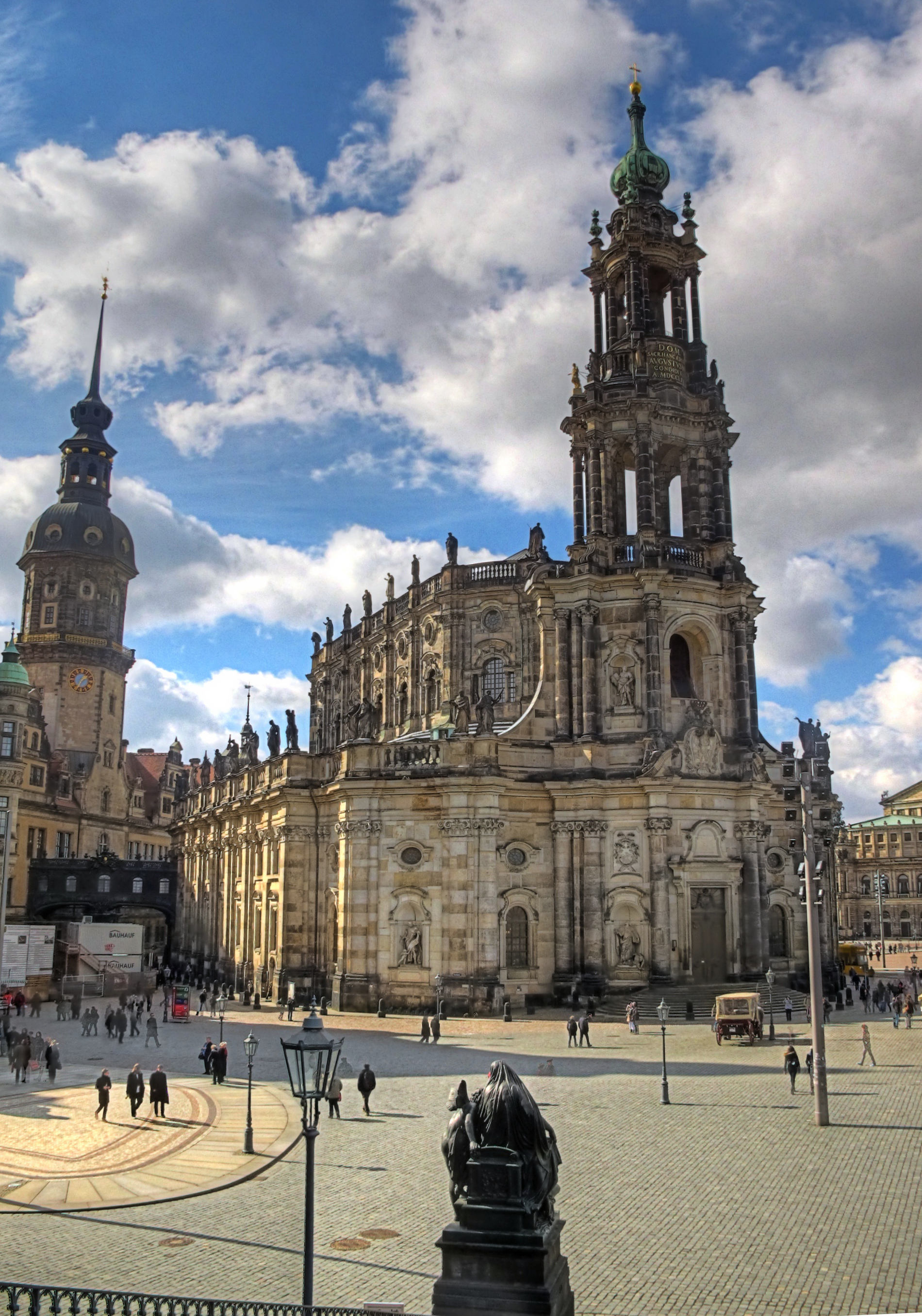 Deutschland, Sachsen, Dresden, katholische Hofkirche und Kathedrale des Bistums Dresden-Meißen Sanctissimæ (Ss.) Trinitatis, von der Brühlschen Terrasse